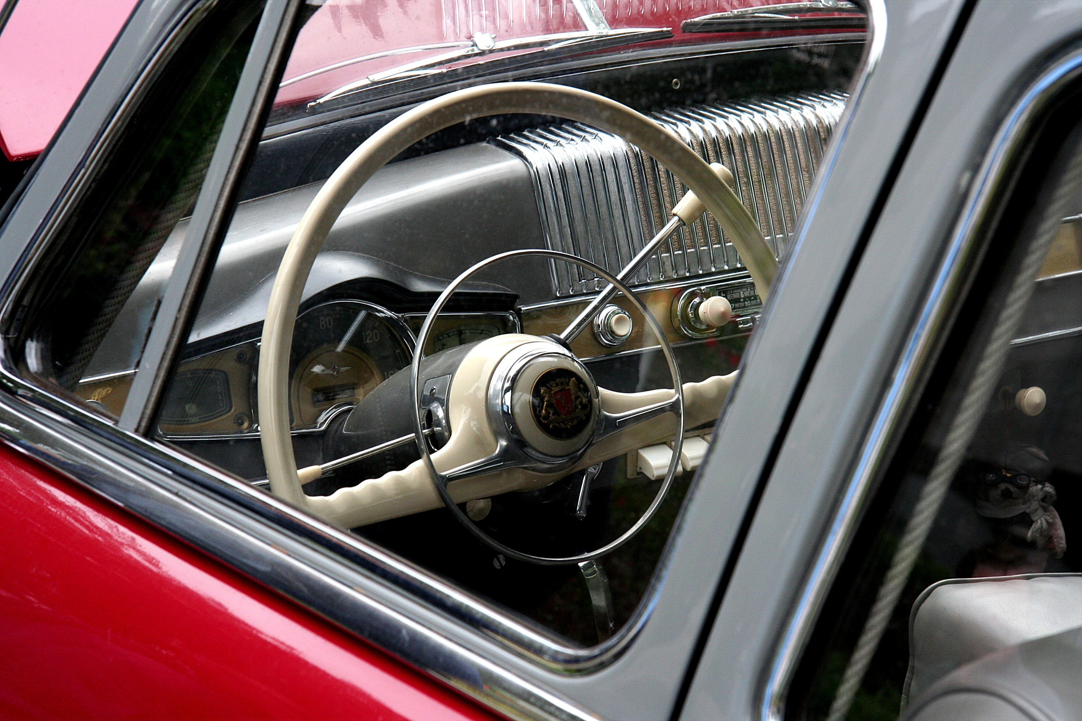 Bildbeschreibung: Borgward Hansa 2400 (Bauzeit 1952 bis 1955) Fotograf: Lothar Spurzem Datum: 08.09.2007 beim Borgward-Treffen in Andernach